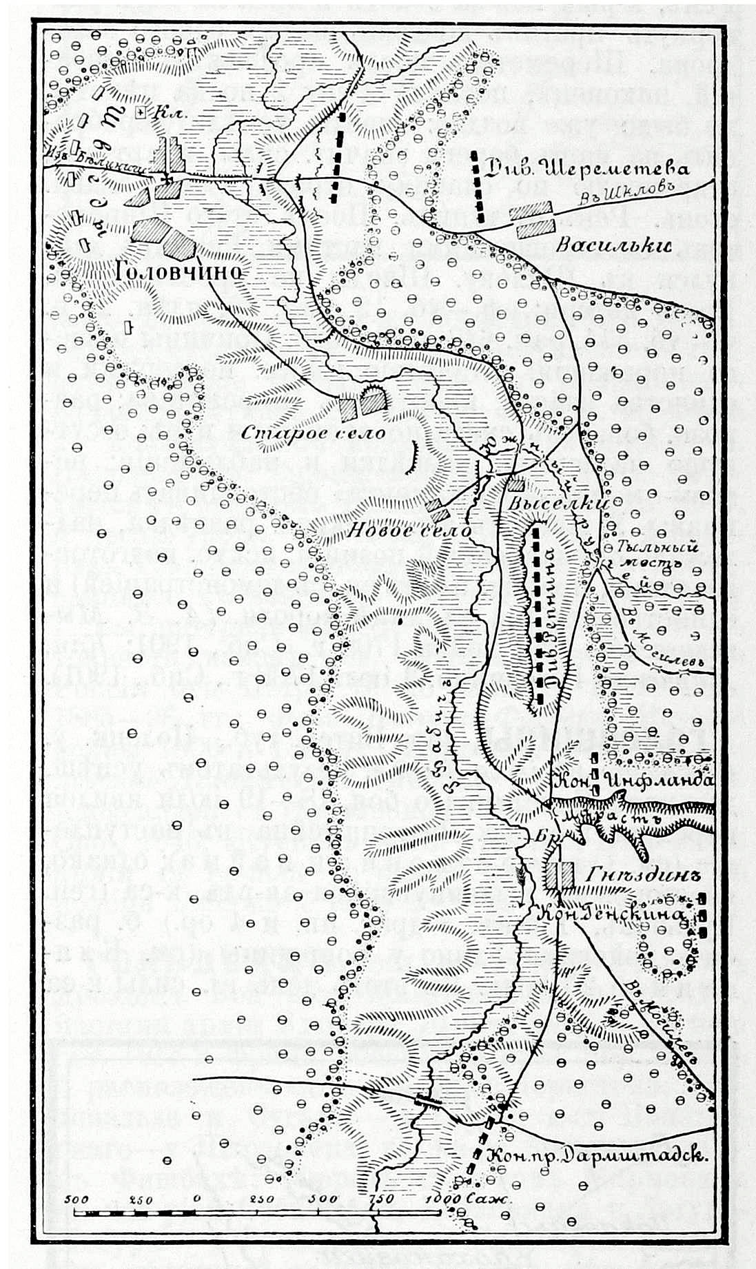 Это изо было использовано в статье «Головчино» опубликованной в восьмом томе «Военной энциклопедии», который был издан книгоиздательским товариществом И. Д. Сытина в 1912 году в столице Российской империи городе Санкт-Петербурге.